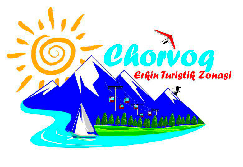 Чарвак